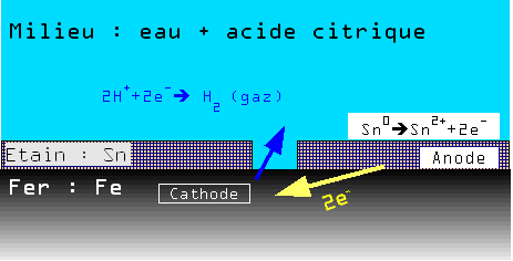 Corrosion galvanique d'une tôle étamé dans un milieu alimentaire (eau + acide citrique).